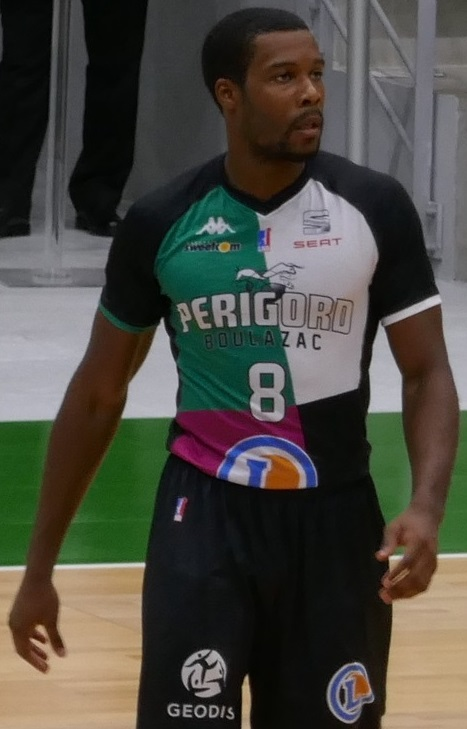 Dustin Ware